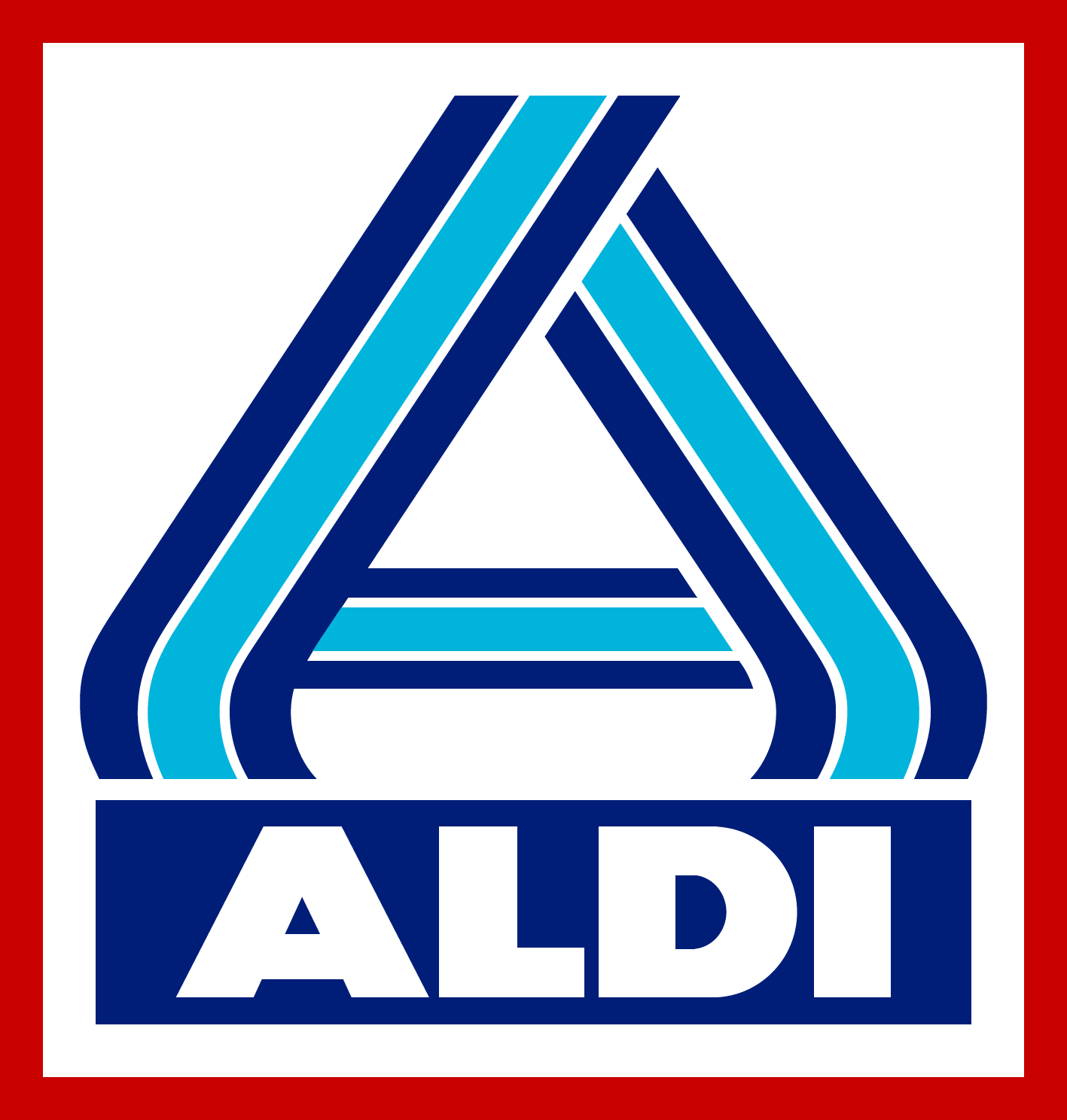 Dies ist das offizielle ALDI Nord Logo der ALDI Einkauf GmbH & Co. oHG in Essen.